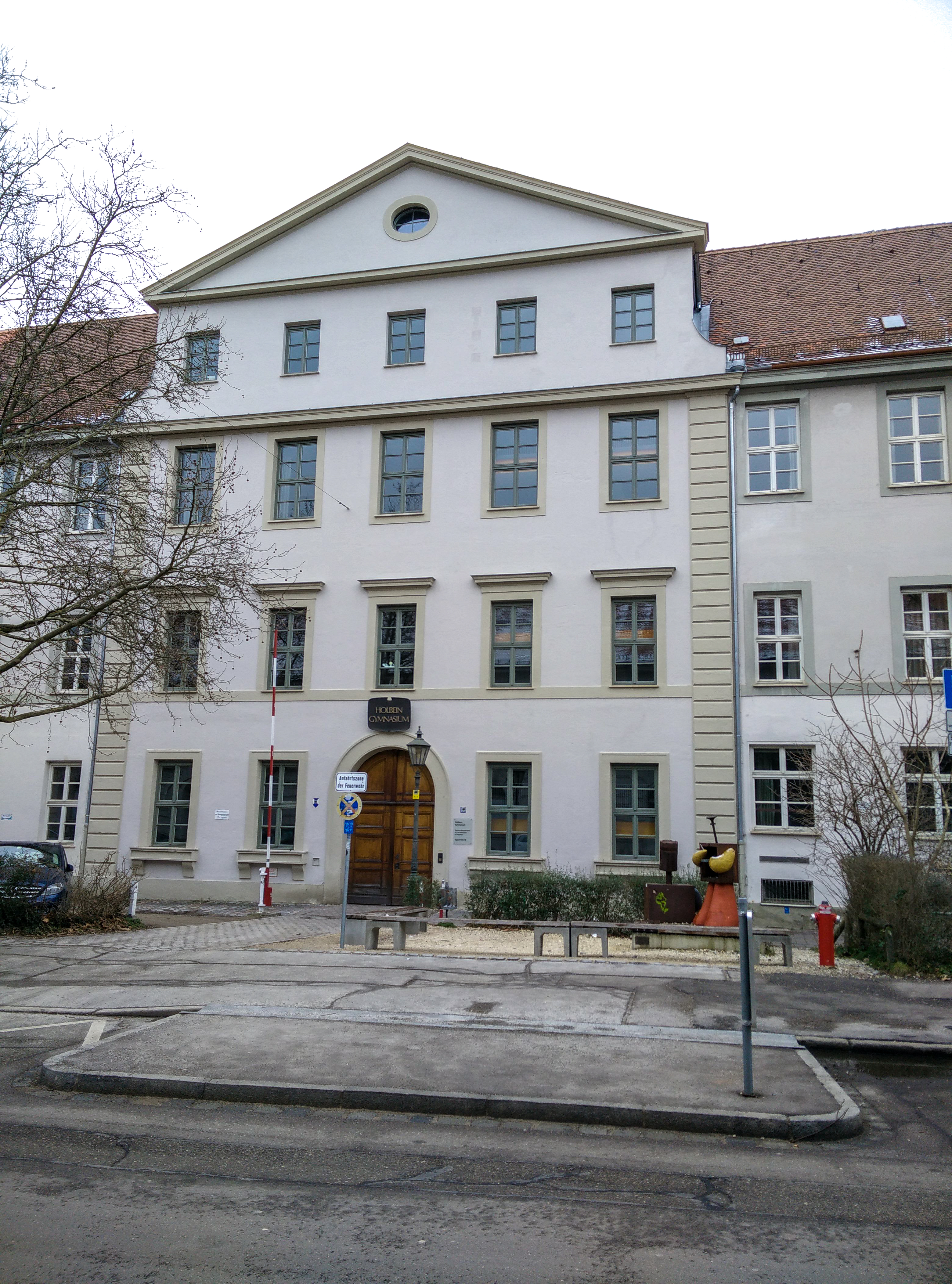 Holbein Gymnasium Augsburg 2015